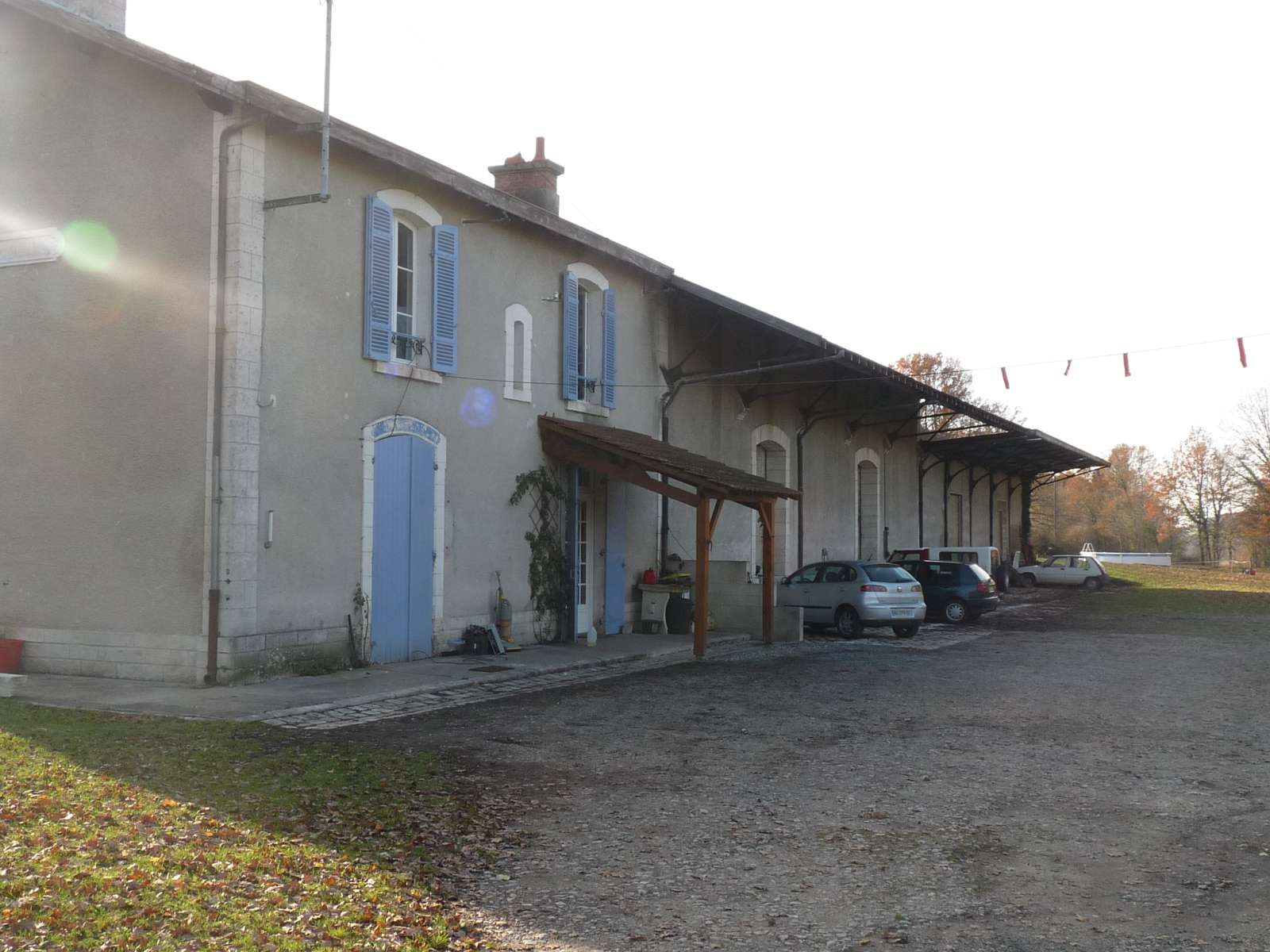 ancienne gare de Petit-Bersac, côté accès, Dordogne, France